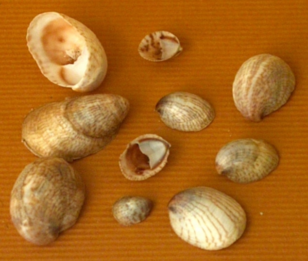 Muiltje Crepidula fornicata